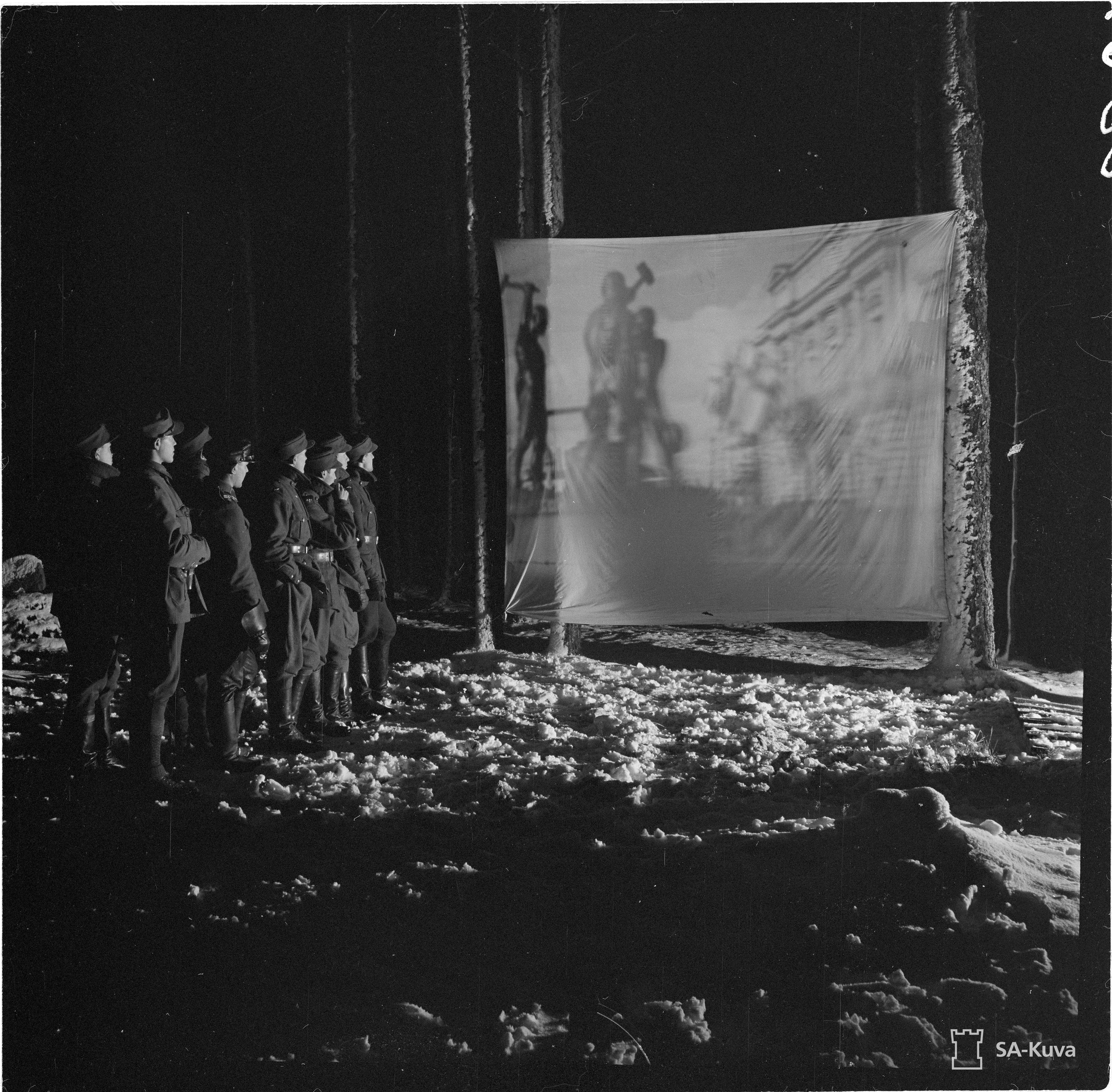 Maan Turva-yhdistys vastasi kansalaisten mielialojen tiedustelutoiminnan ohella viihdytyskiertueista rintamalla. Elokuvaesitys 1.11.1939 Karjalankannaksella, juuri ennen talvisodan syttymistä. SA-kuva 1299.